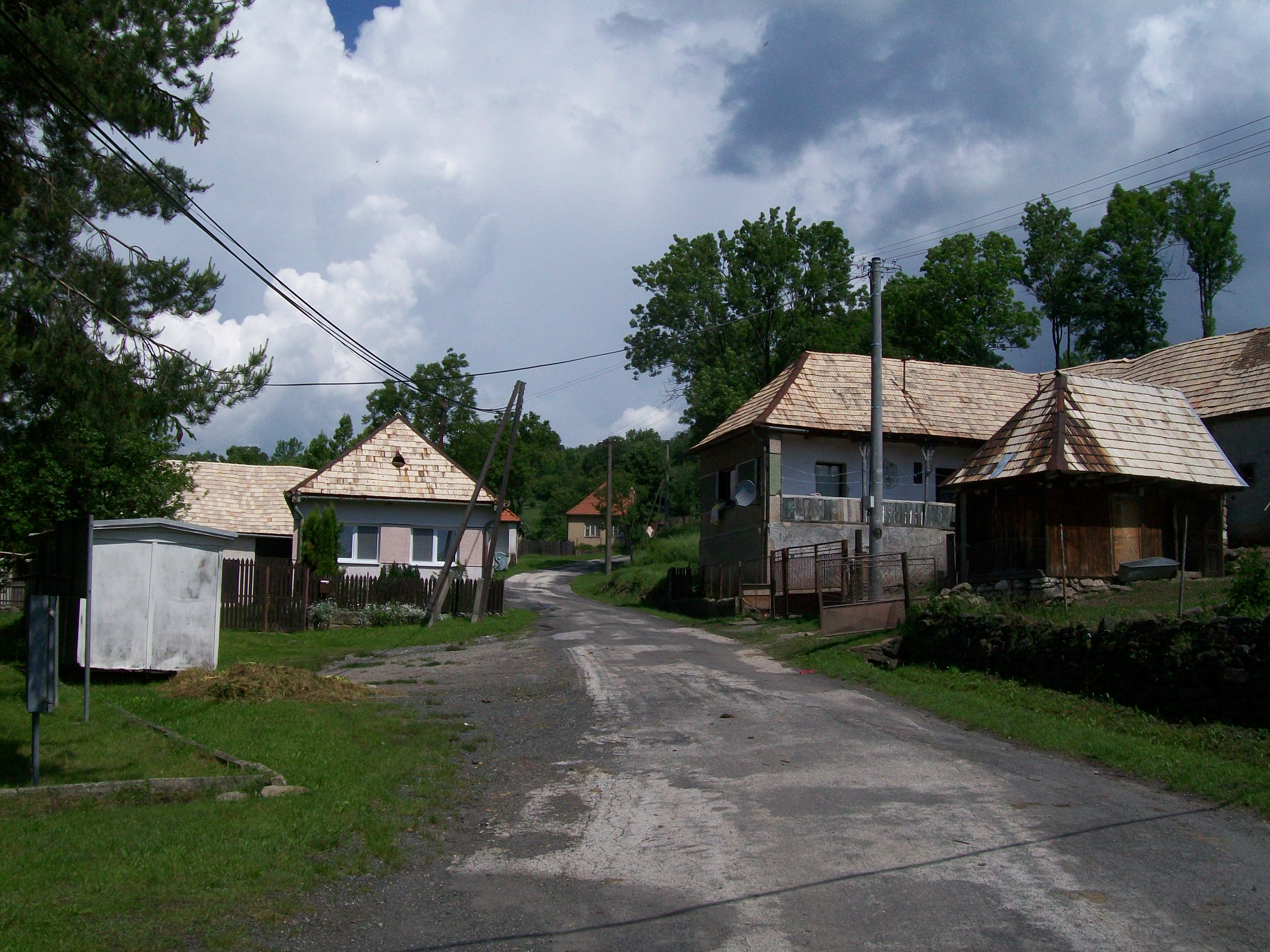 Ulica obce Lentvora